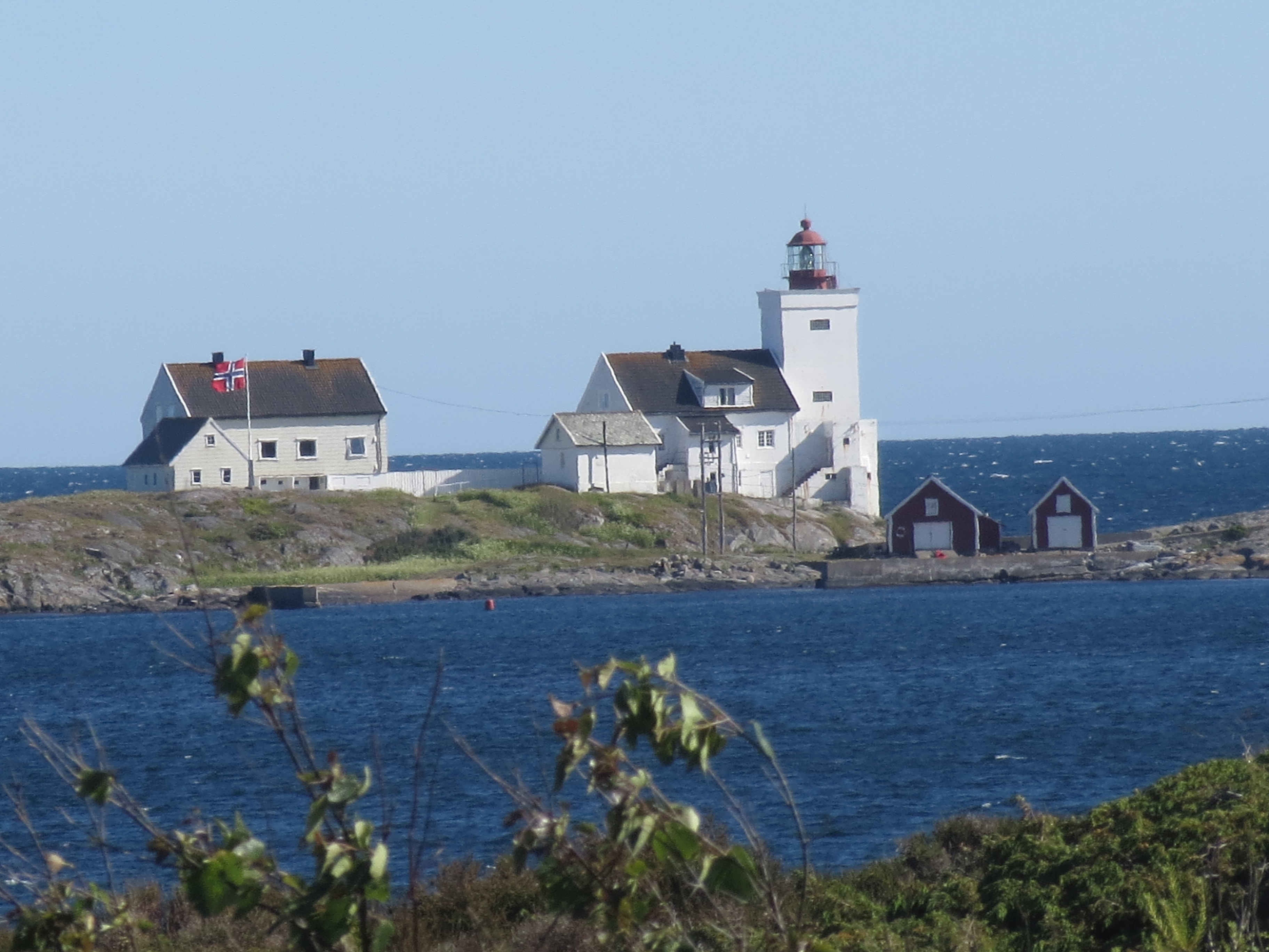 Homborsund fyr 2015, Grimstad